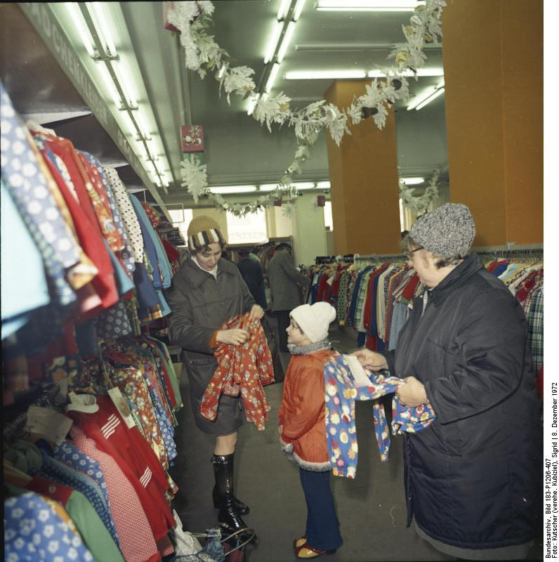 ADN-ZB/Kutscher/8.12.75/Berlin: Andrea beim vorweihnachtlichen Einkauf wählt mit großer Freude unter der farbenfrohen und pflegeleichten Oberbekleidung im "Haus des Kindes". Anschließend bummelt Mutti noch mit ihr über den Weihnachtsmarkt.